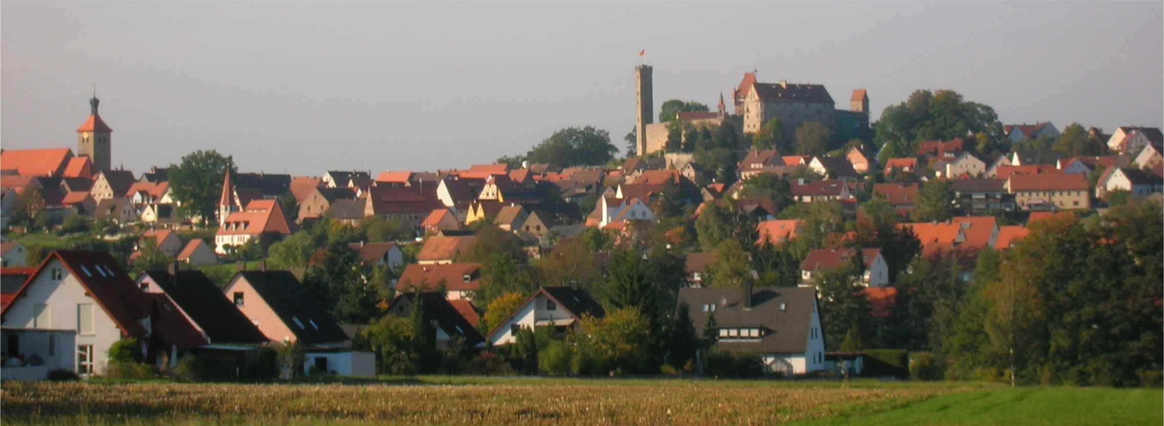 ABENBERG Blick von Süden auf die Kleinstadt Herbst 2005